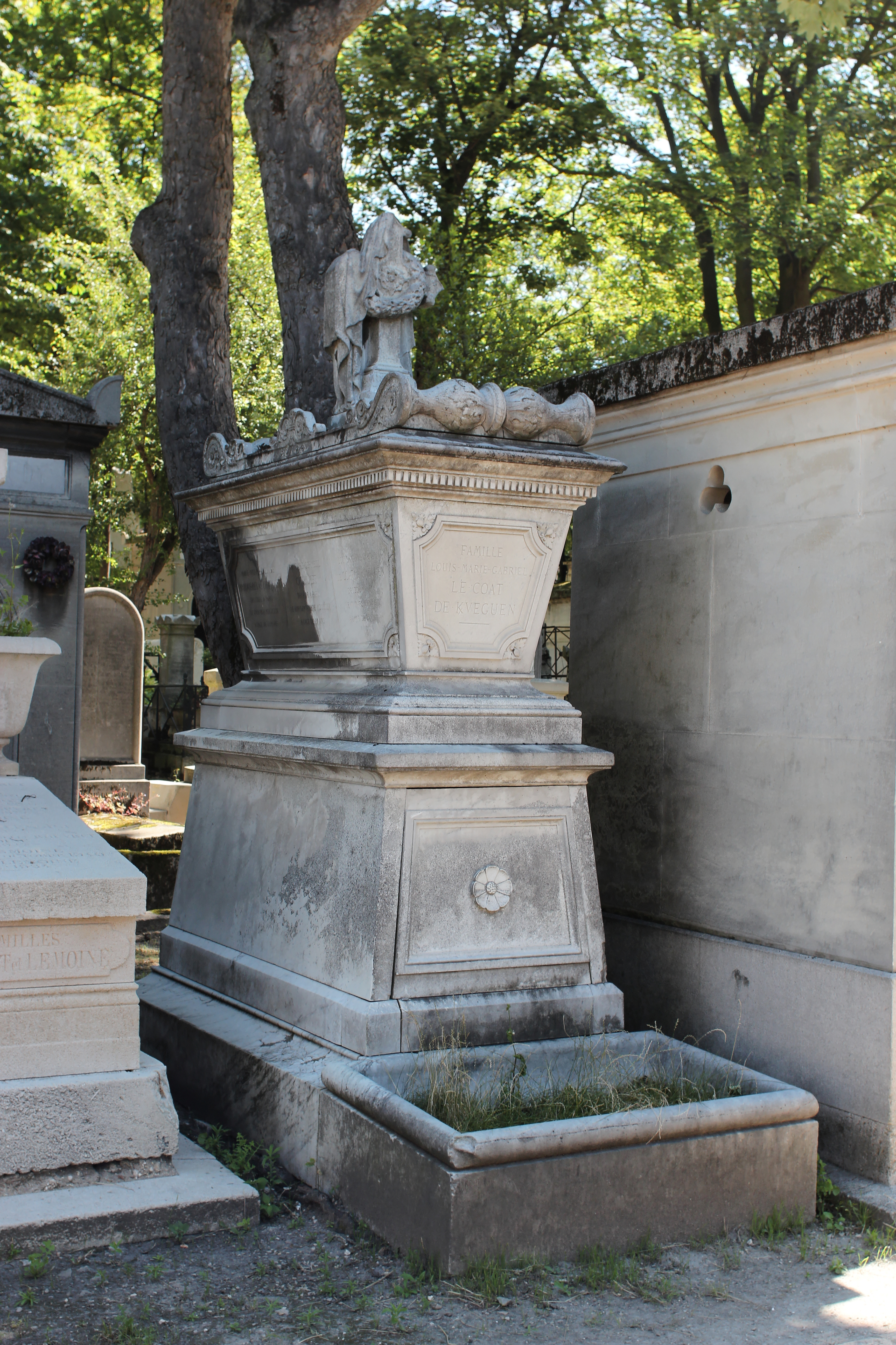 Vue depuis le chemin du Dragon.